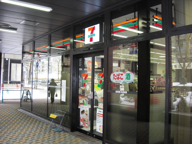 看板がネオンサインになっている